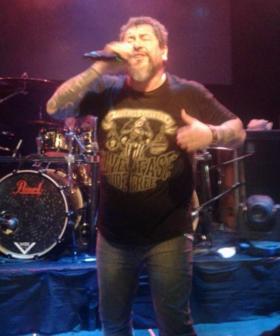 Walter Meza en concierto.